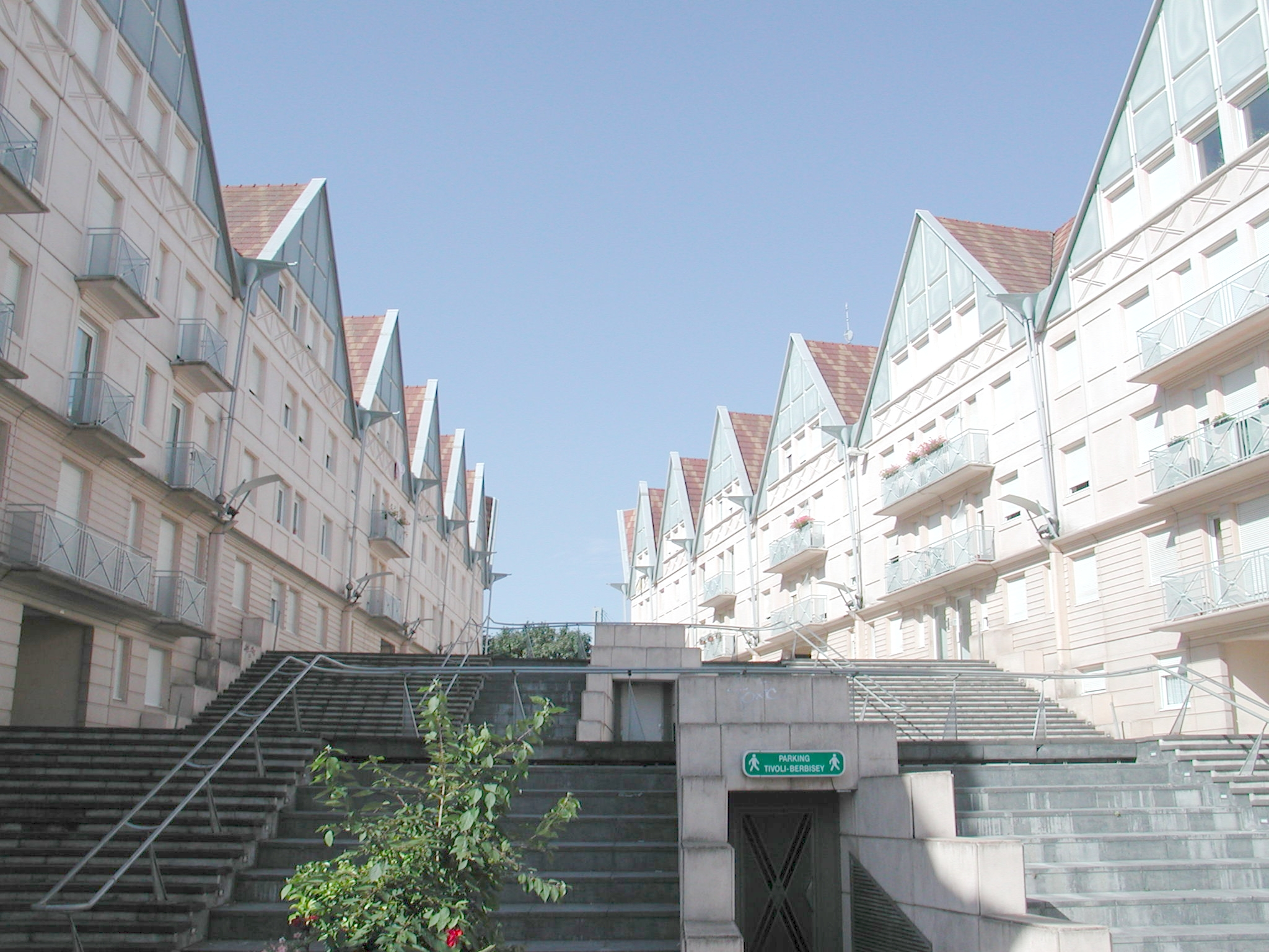 Rue de Dijon, Bourgogne